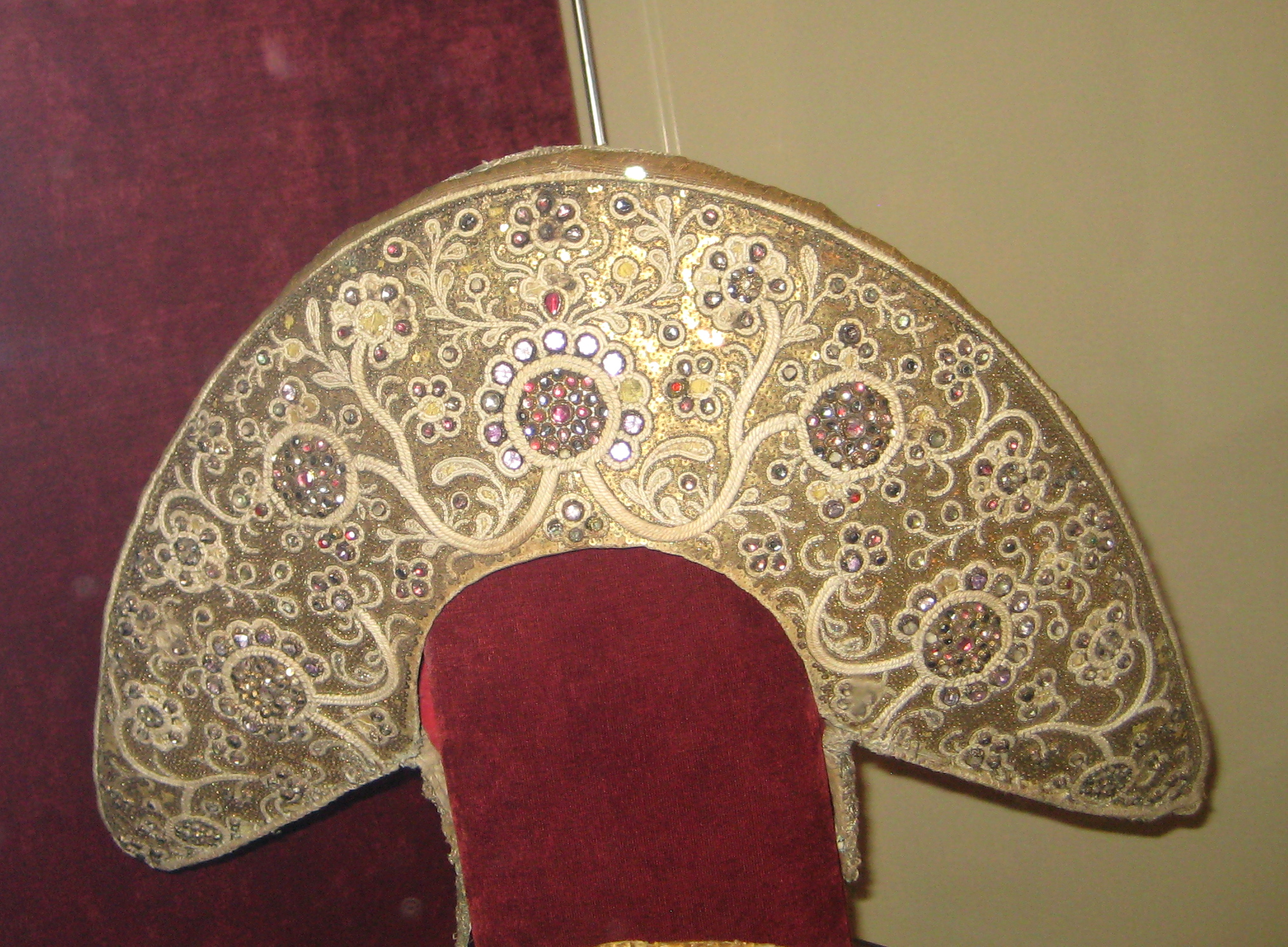 Кокошник. Центральные губернии. Сер. 19 века. Лен, кумач, блестки, стекло, позумент, металл, бумага